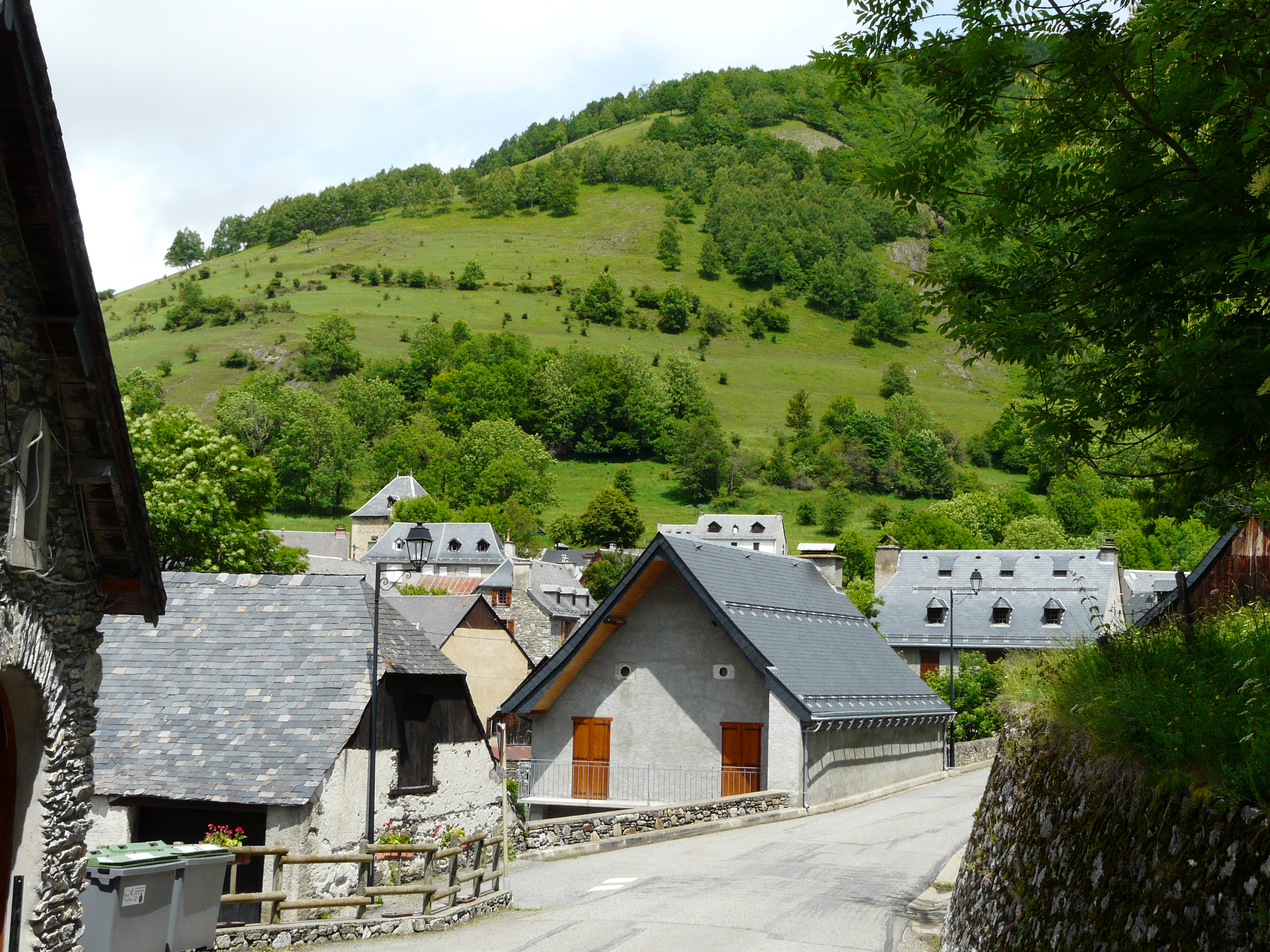 Le village de Mayrègne, Haute-Garonne, France.